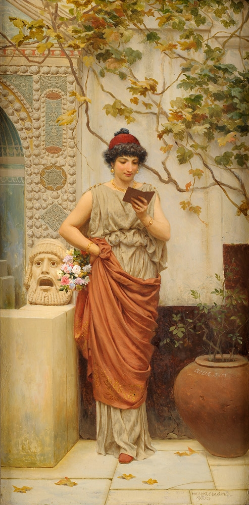 Картины Степа́на Владисла́вовича Бакало́вича (Сте́фан Алекса́ндр Бакало́вич, польск. Stefan Aleksander Bakałowicz; 17 октября 1857, Варшава — 1947, Рим) — польского живописца